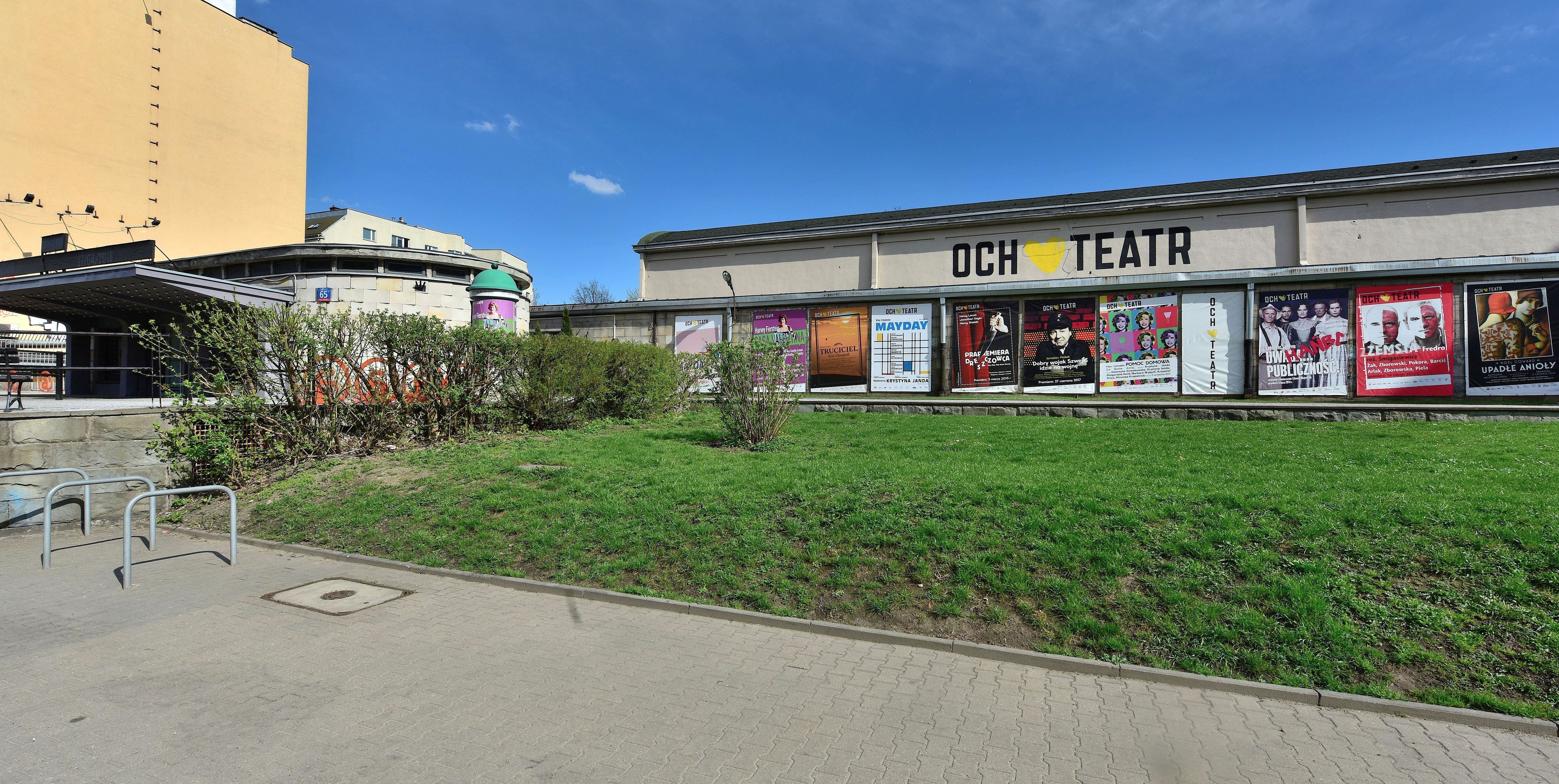 OCH-Teatr przy ul. Grójeckiej 65 w Warszawie